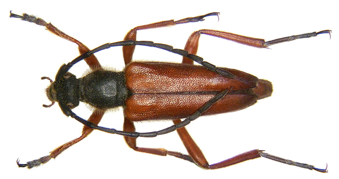 Stictoleptura rufa (Brullé, 1833) Groesse: 11-16 mm Verbreitung: Südosteuropa Ökologie: Entwicklung unbekannt Fundort: Türkei, Marmaris, Hisarönü leg. U.Schmidt, 1997; det. Weigel Photo: U.Schmidt, 2006